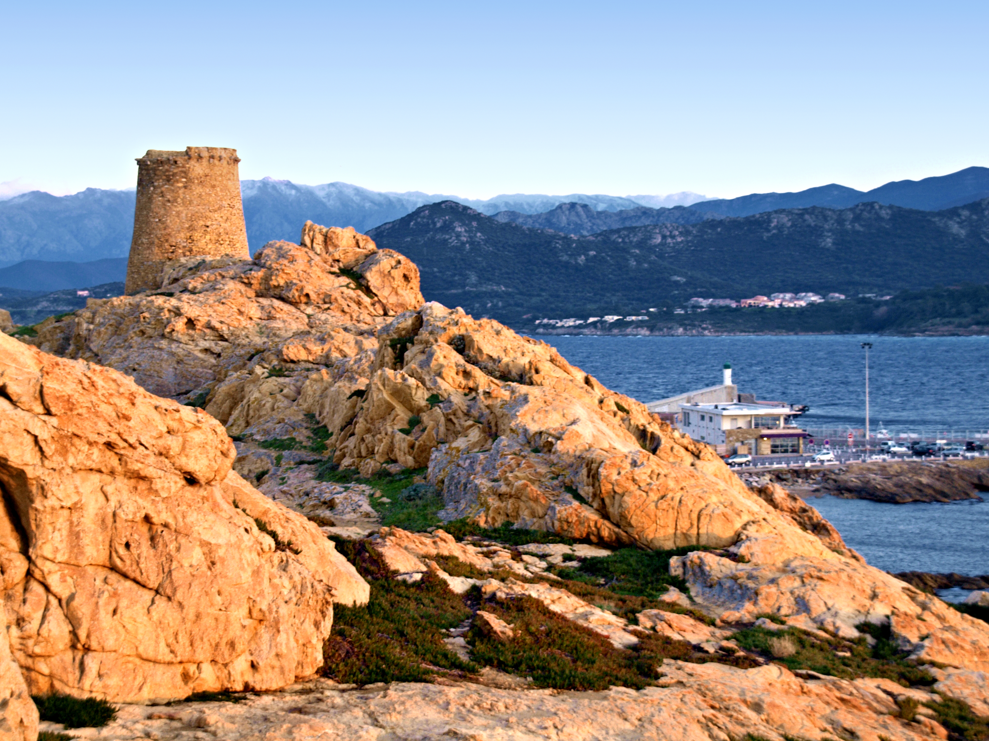 L'Île-Rousse (Corsica) - La tour génoise de la Pietra